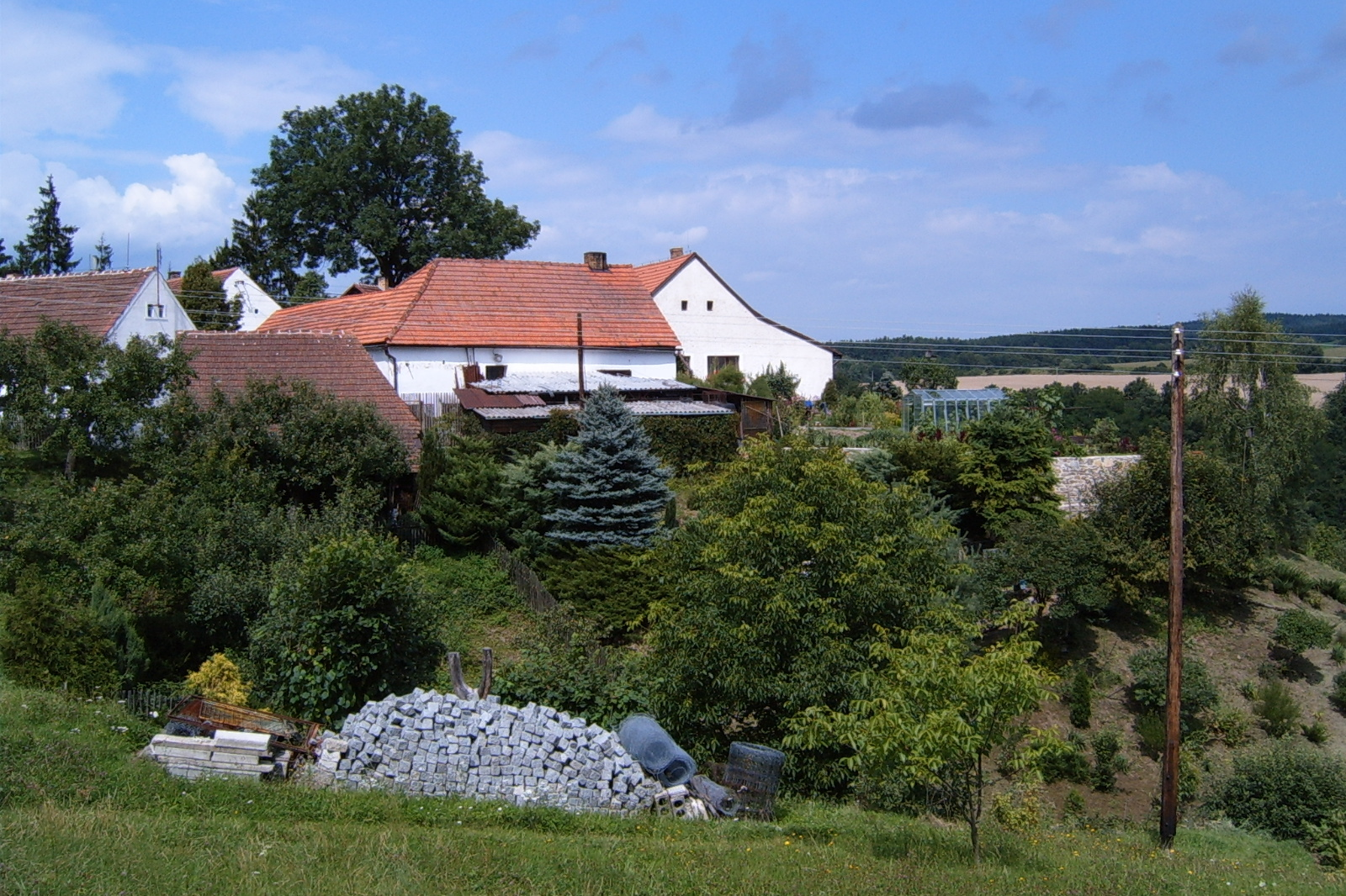 Celkový pohled na místo, kde stával hrad